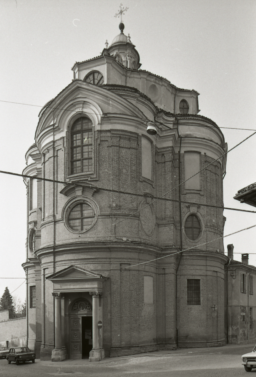 Bra. Chiesa di Santa Chiara di Bernardo Antonio Vittone (1742). Servizio fotografico : Bra, 1981 / Paolo Monti. - Strisce: 7, Fotogrammi complessivi: 36 : Negativo b/n, gelatina bromuro d'argento/ pellicola ; 35 mm. - ((Sul portanegativi: N[I]K[MA]T FP4. - : Nikon Leika 3001-/ Monti 1978 (1978), presso Archivio Paolo Monti. - Fonte: Agenda di Paolo Monti